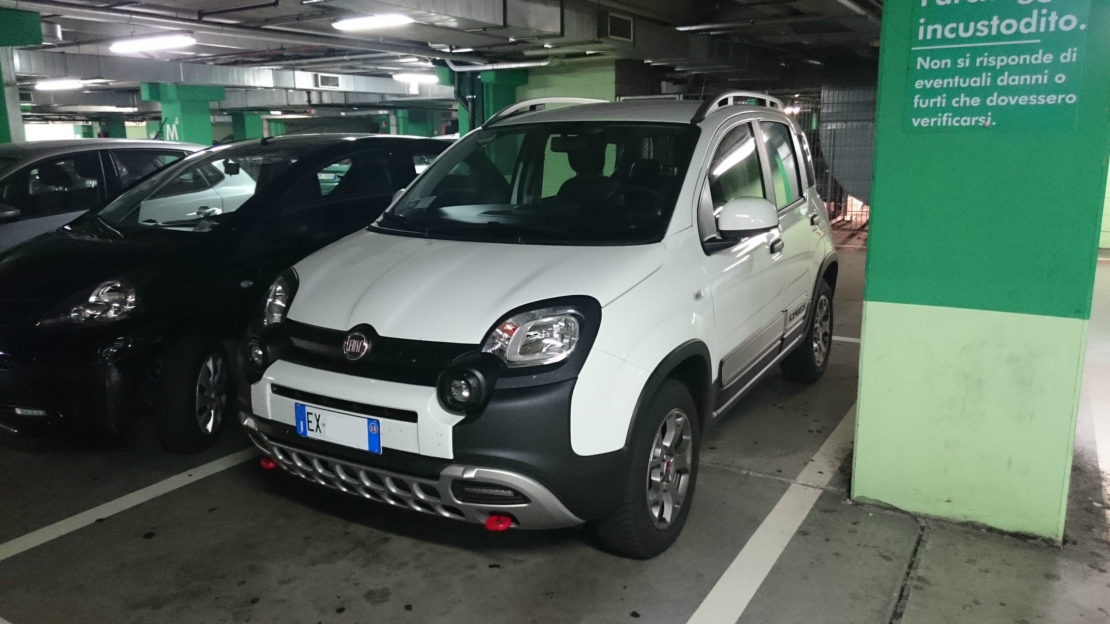 Una Fiat Panda Cross 4x4 a Milano